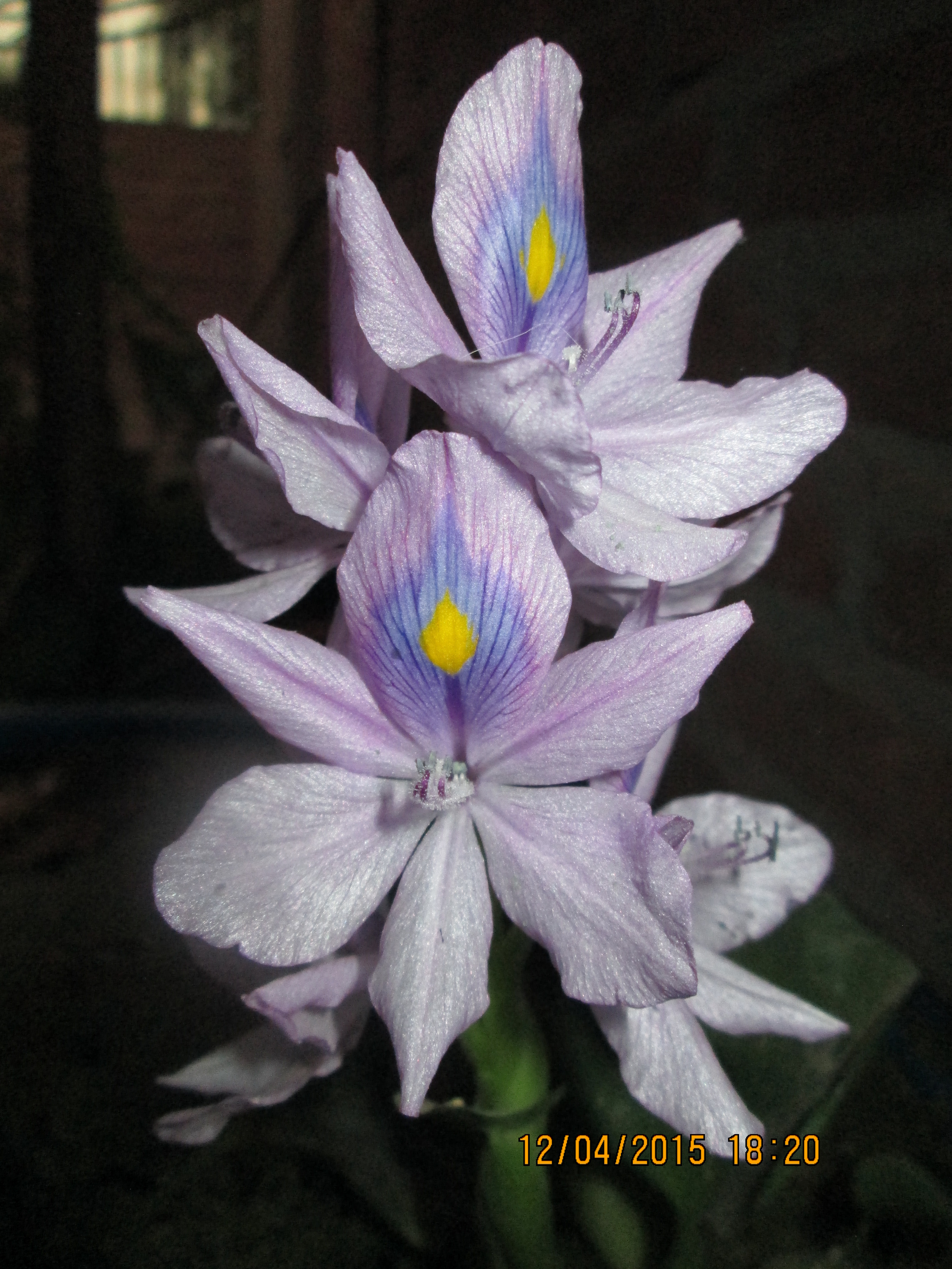 éstas son las hermosas flores de Eichhornia crassipes